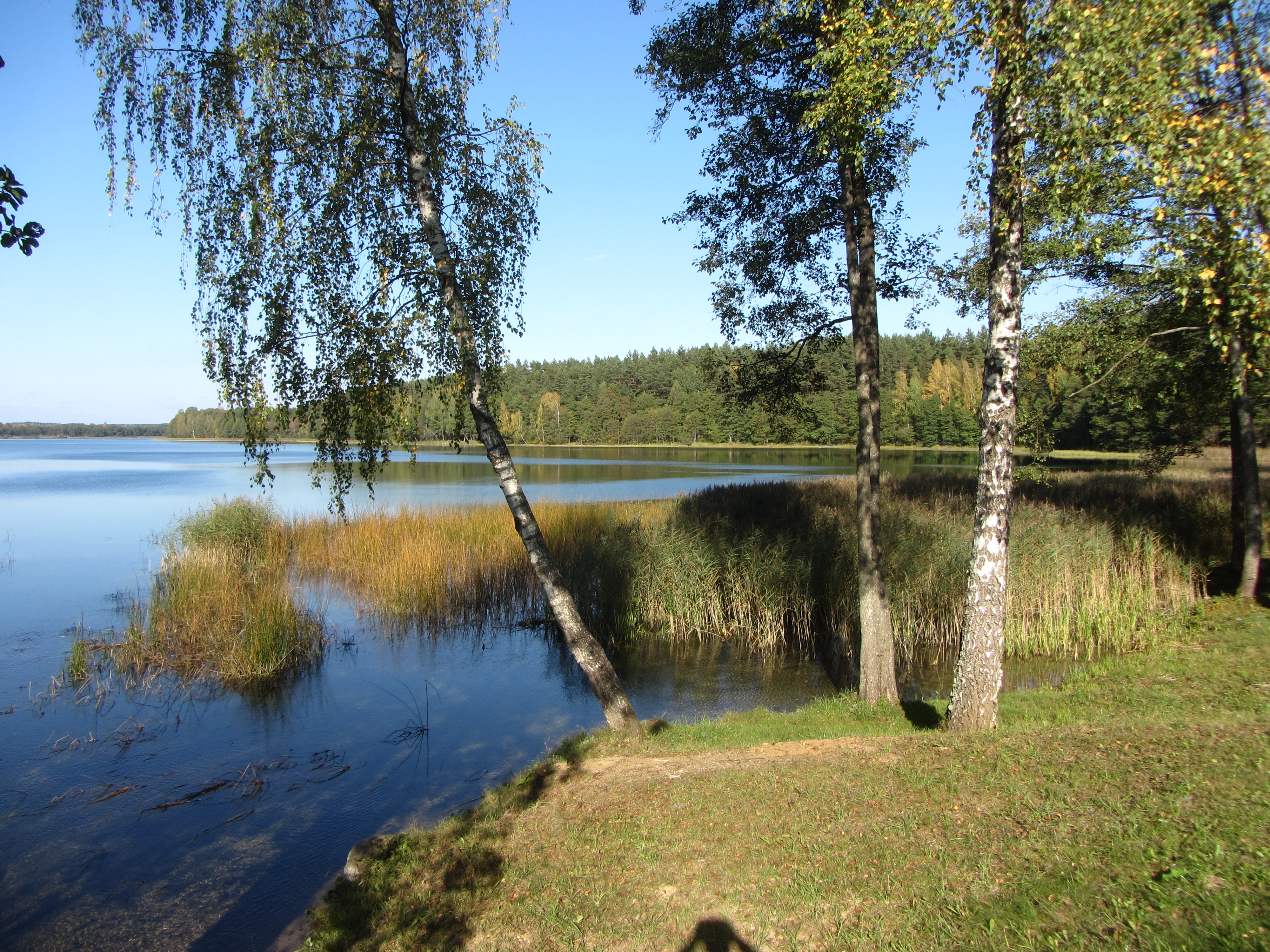 Drūtūnai 30204, Lithuania